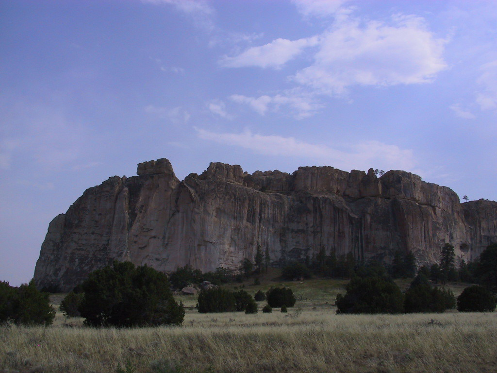 El Morro